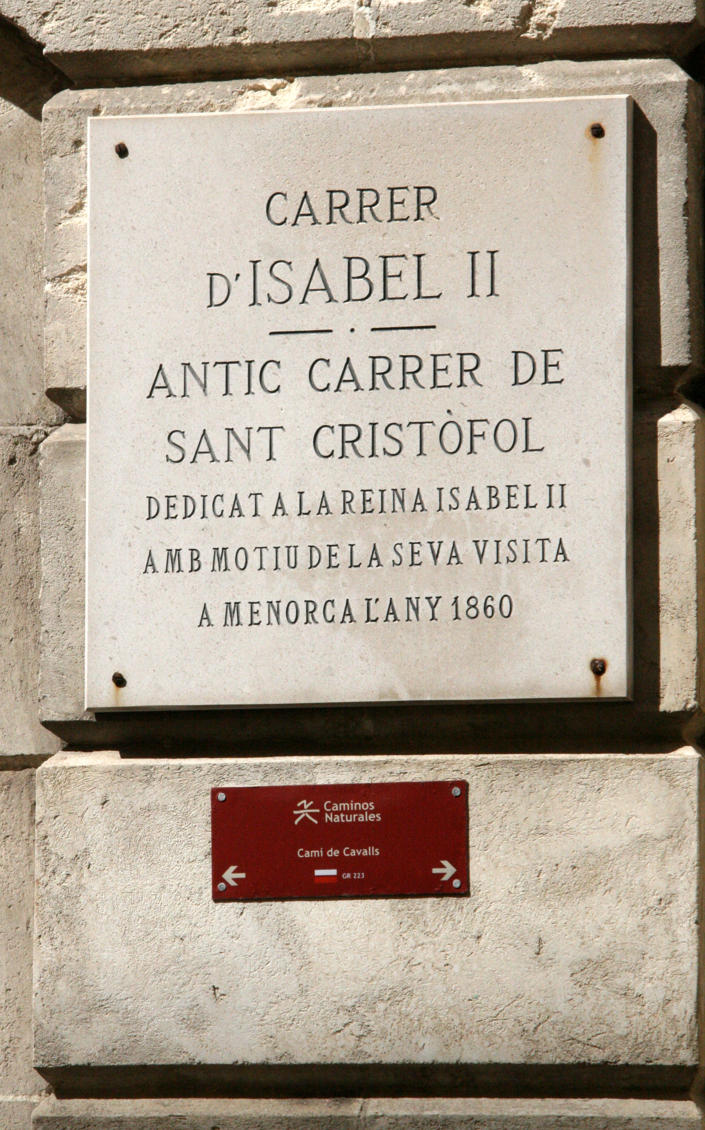 Indicador del camí de Cavalls en la calle Isabel II de Maó